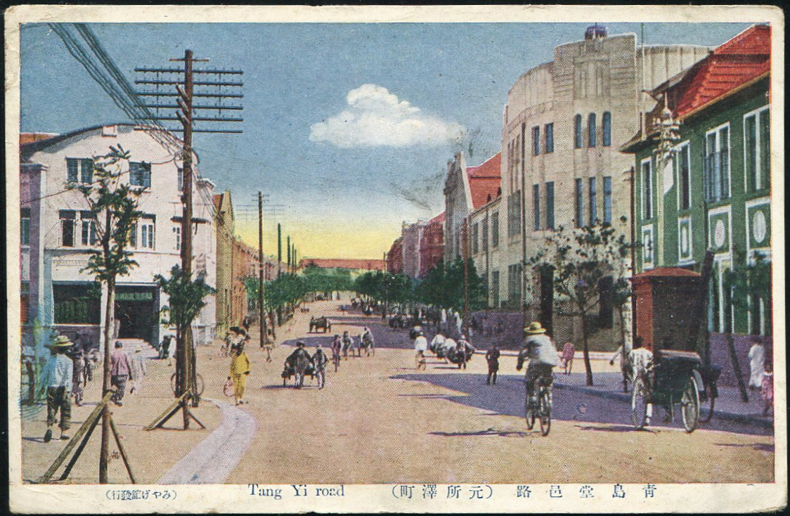 青岛堂邑路中山路路口旧明信片